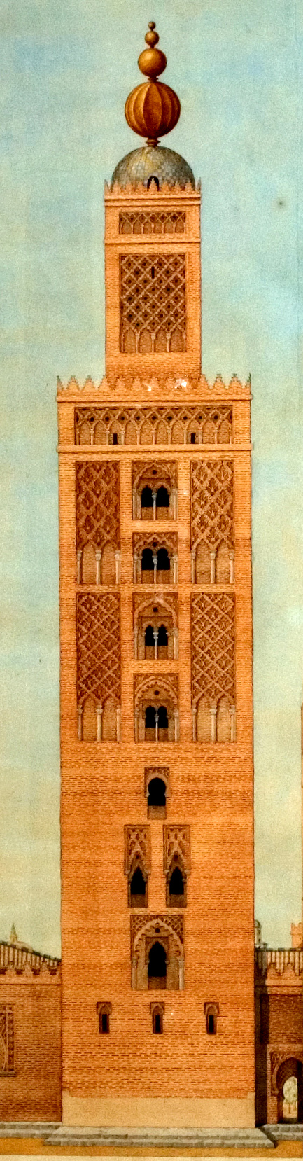 Estado almohade de la Giralda derivada de los tres principales estados de la torre de Sevilla, 1909, de Alejandro Guichot (Museo de Artes y Costumbres Populares de Sevilla)